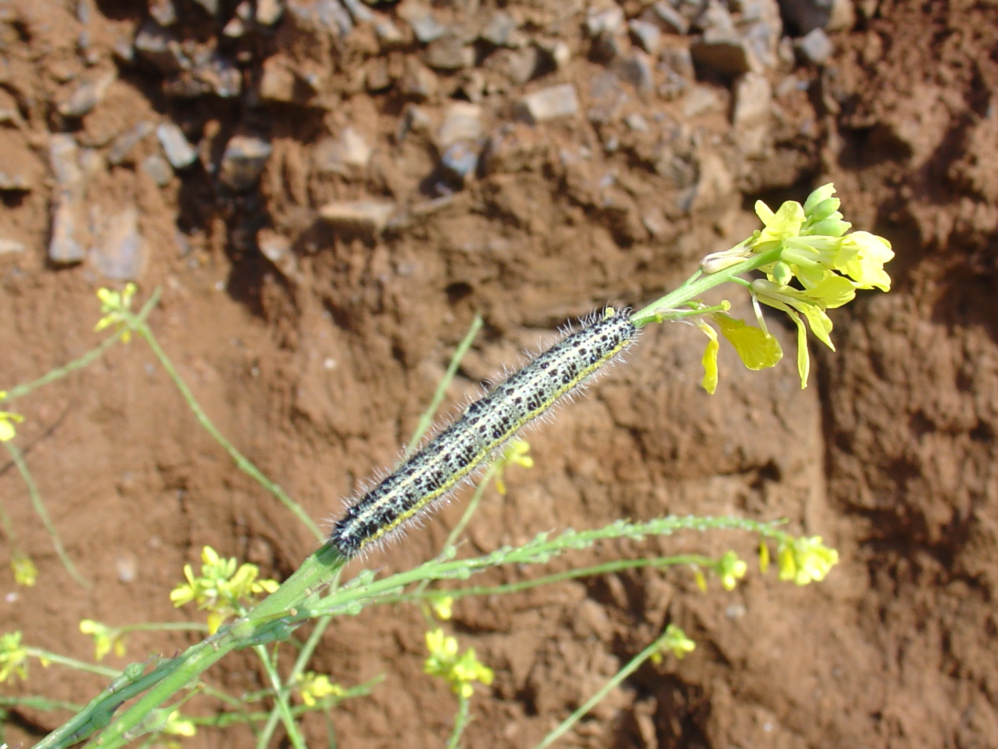 Undetermined caterpillar, Rapistrum rugosum